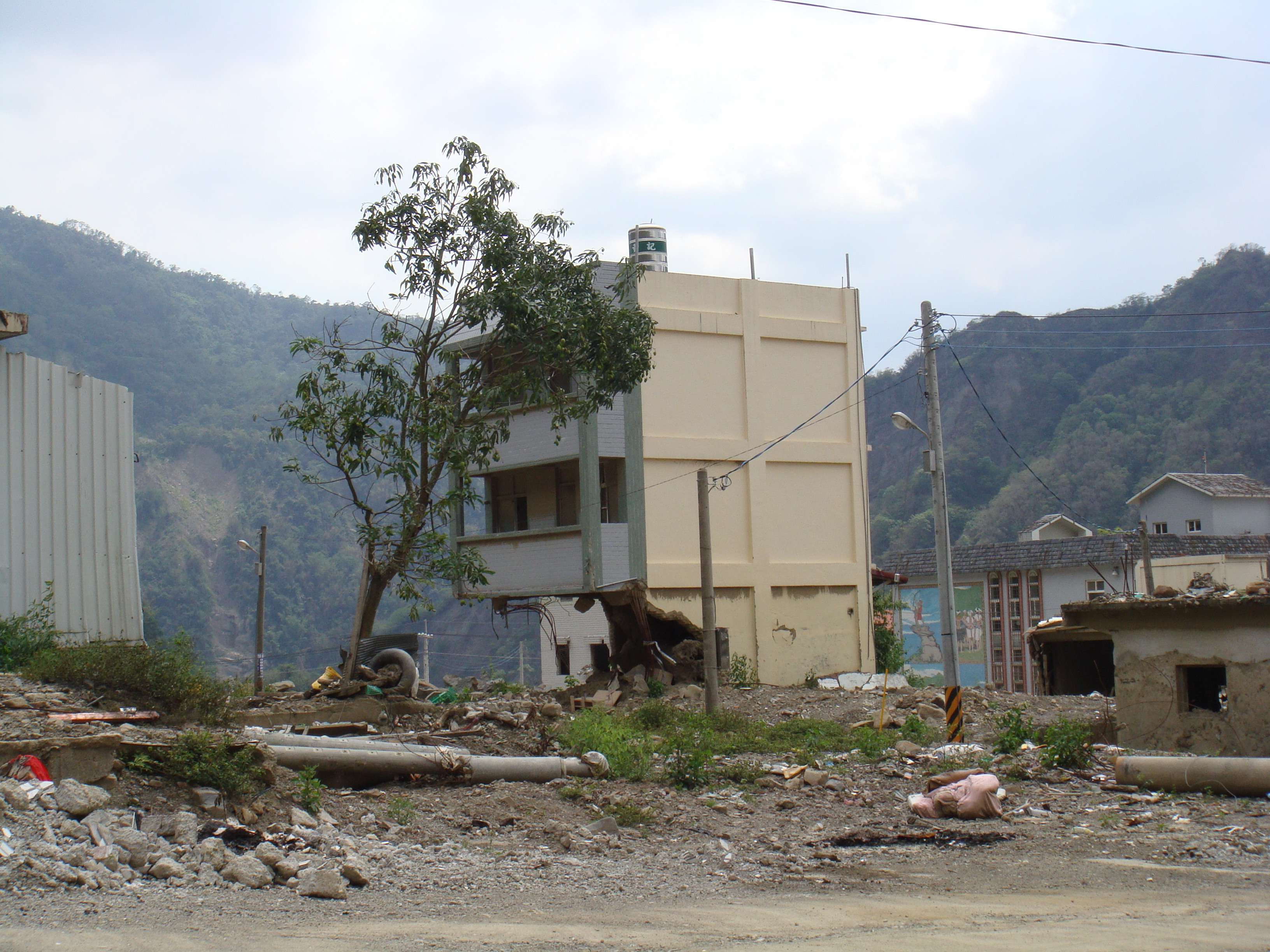 那瑪夏鄉舊鄉公所附近，88水災後殘留的土石與廢棄房舍。